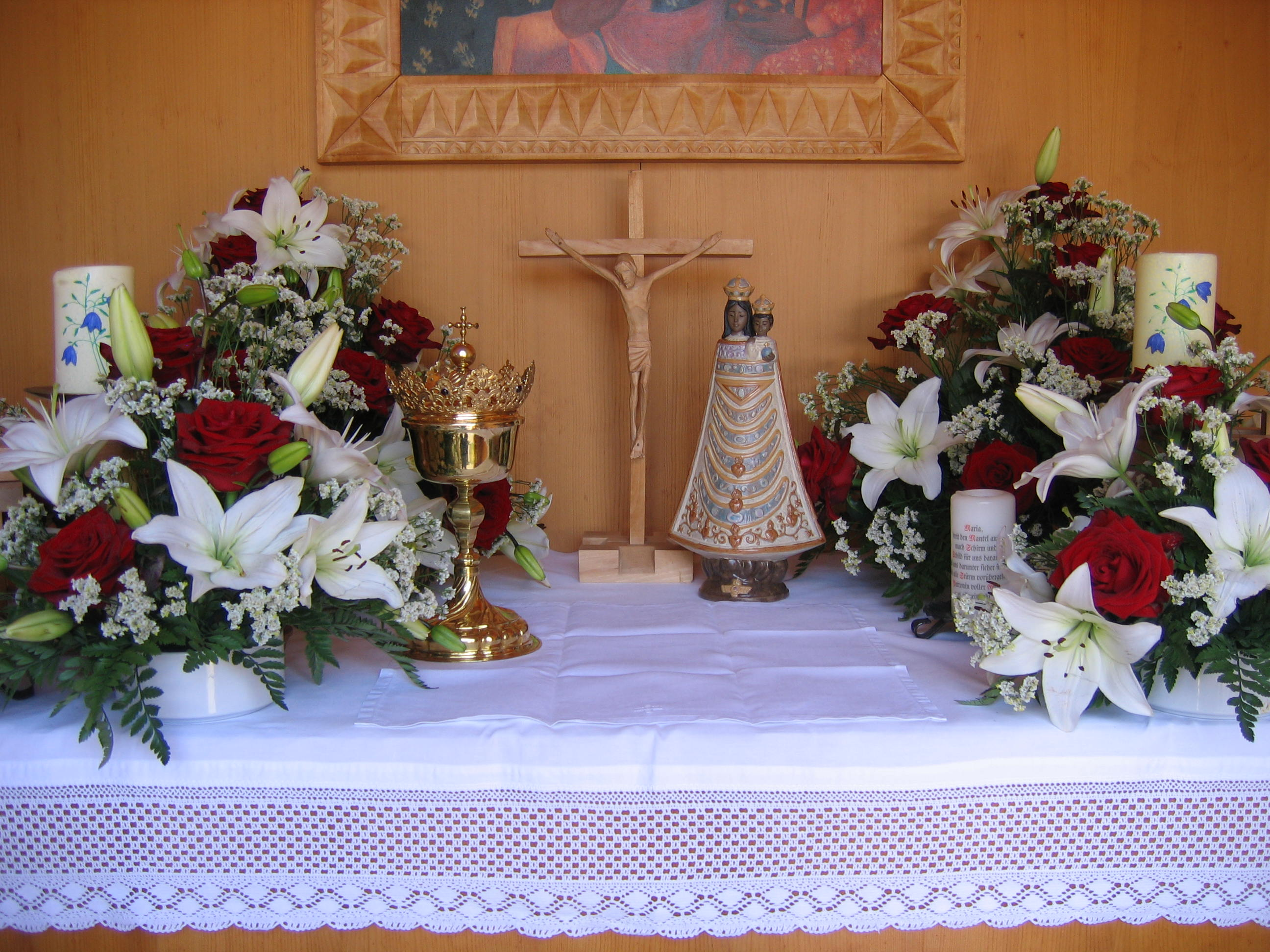 Altar mit der Marienkapelle, in der Mitte die Loretta-Madonna des Piloten